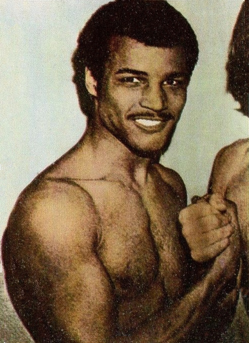 CAMPIONI dello SPORT 1973/74-Figurina n.307- JOHN CONTEH -PUGILATO-Rec